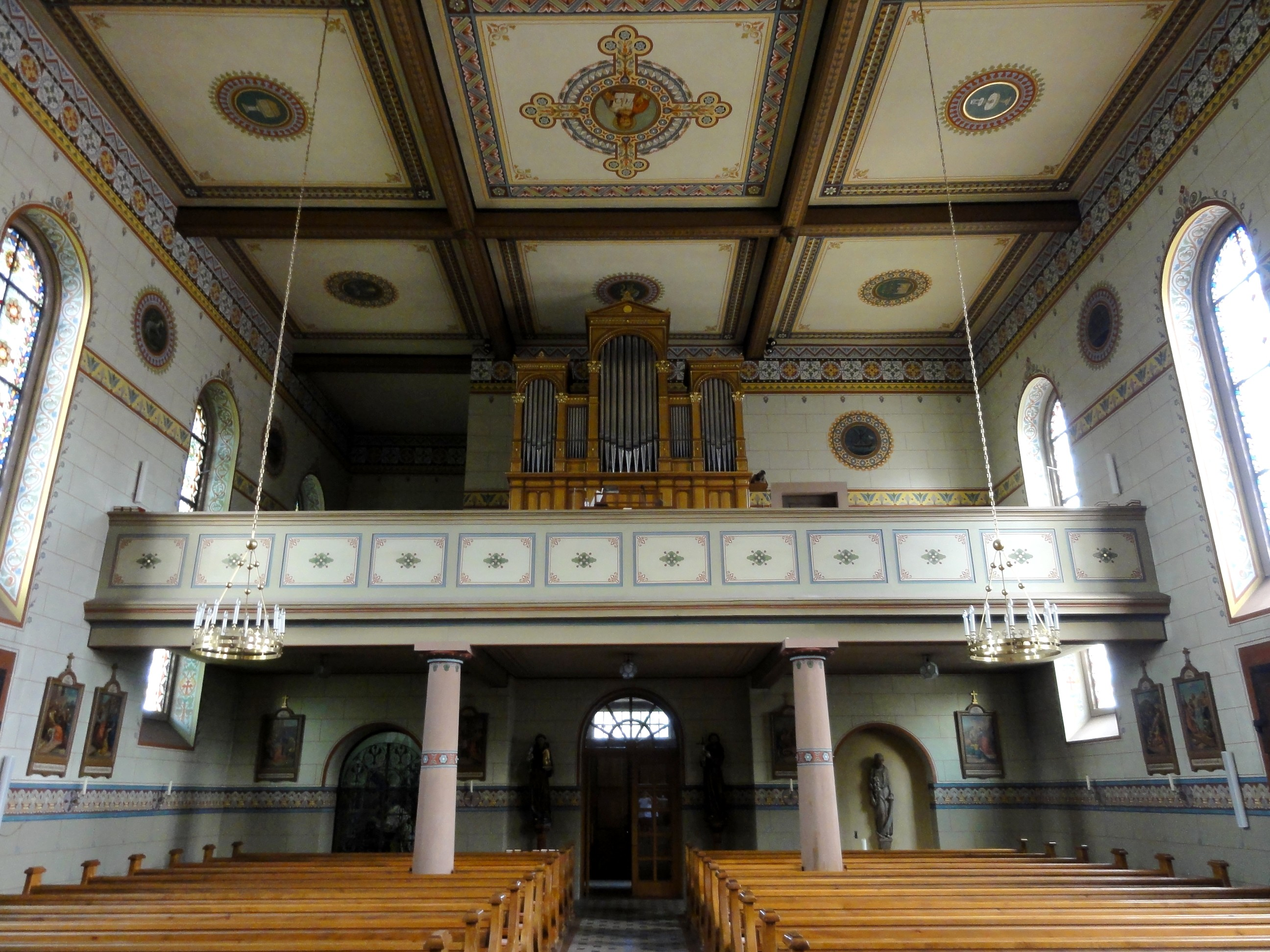 Baden-Württemberg, Bollschweil, Pfarrkirche St. Hilarius